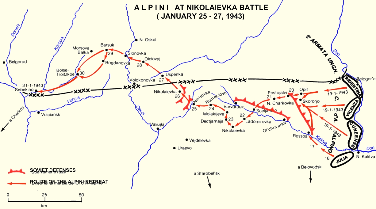 Foto digital de la ruta de los Alpinos italianos hacia Nikolaievka, tomada de imagen en libro sobre el ARMIR en Rusia durante la segunda guerra mundial. La foto ha sido cambiada con mi software, agregando algunas palabras.